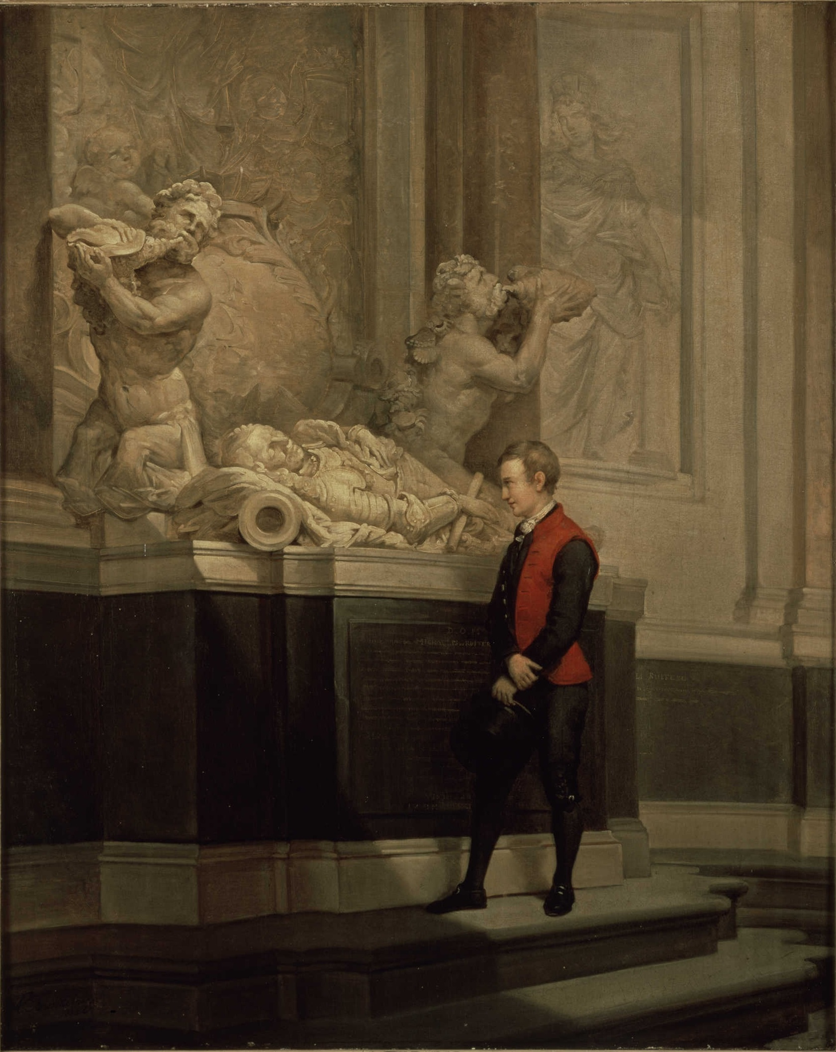 schilderij; wezenzorg; heldenverering; Speyk, Jan van; Burgerweeshuis; Ruyter, Michiel Adriaensz. de; portret; mansportret; interieur; burgerwezen; heldenverering; Speyk, Jan van